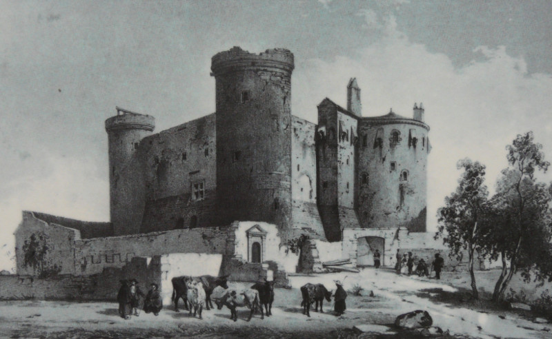 Castle of Saint Vidal